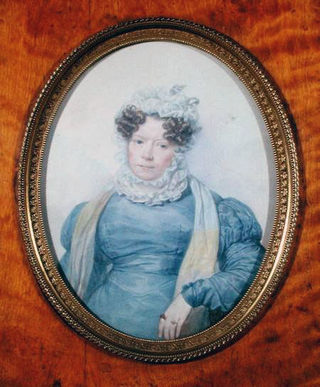 С.П.Свечина